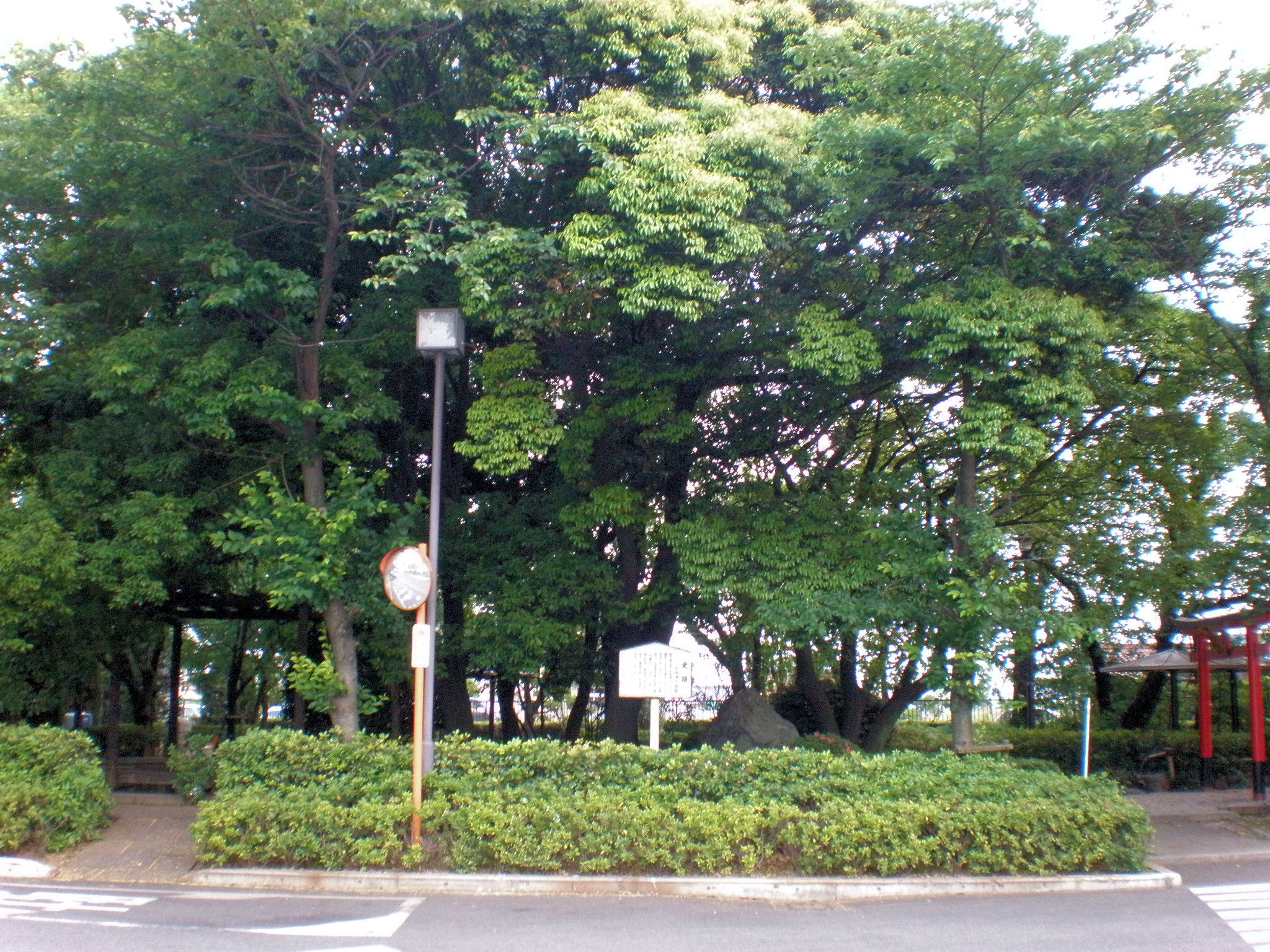 愛知県小牧市東3丁目の東海ゴム工業本社工場敷地内にある宇田津砦跡